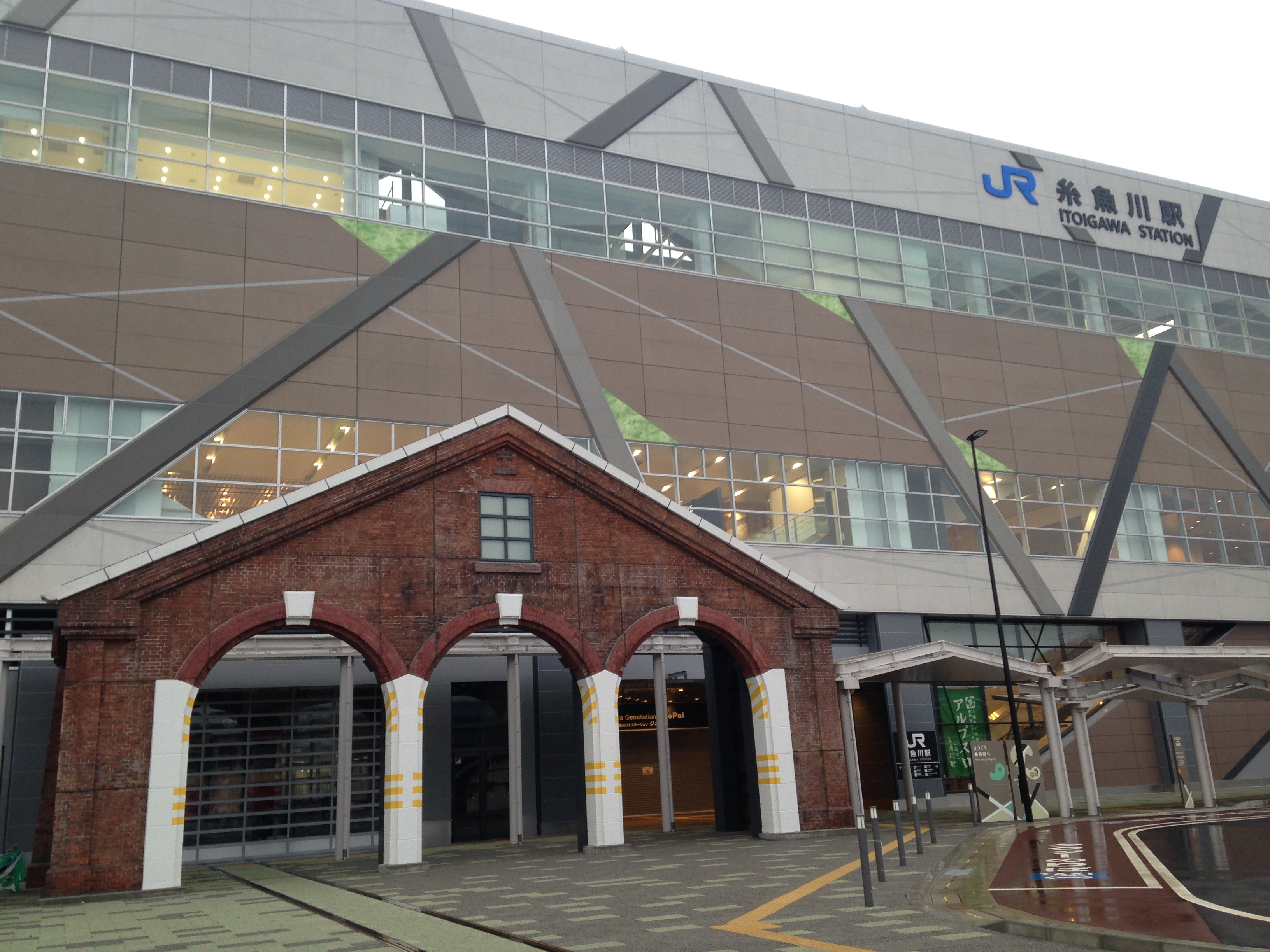 糸魚川駅(アルプス口)